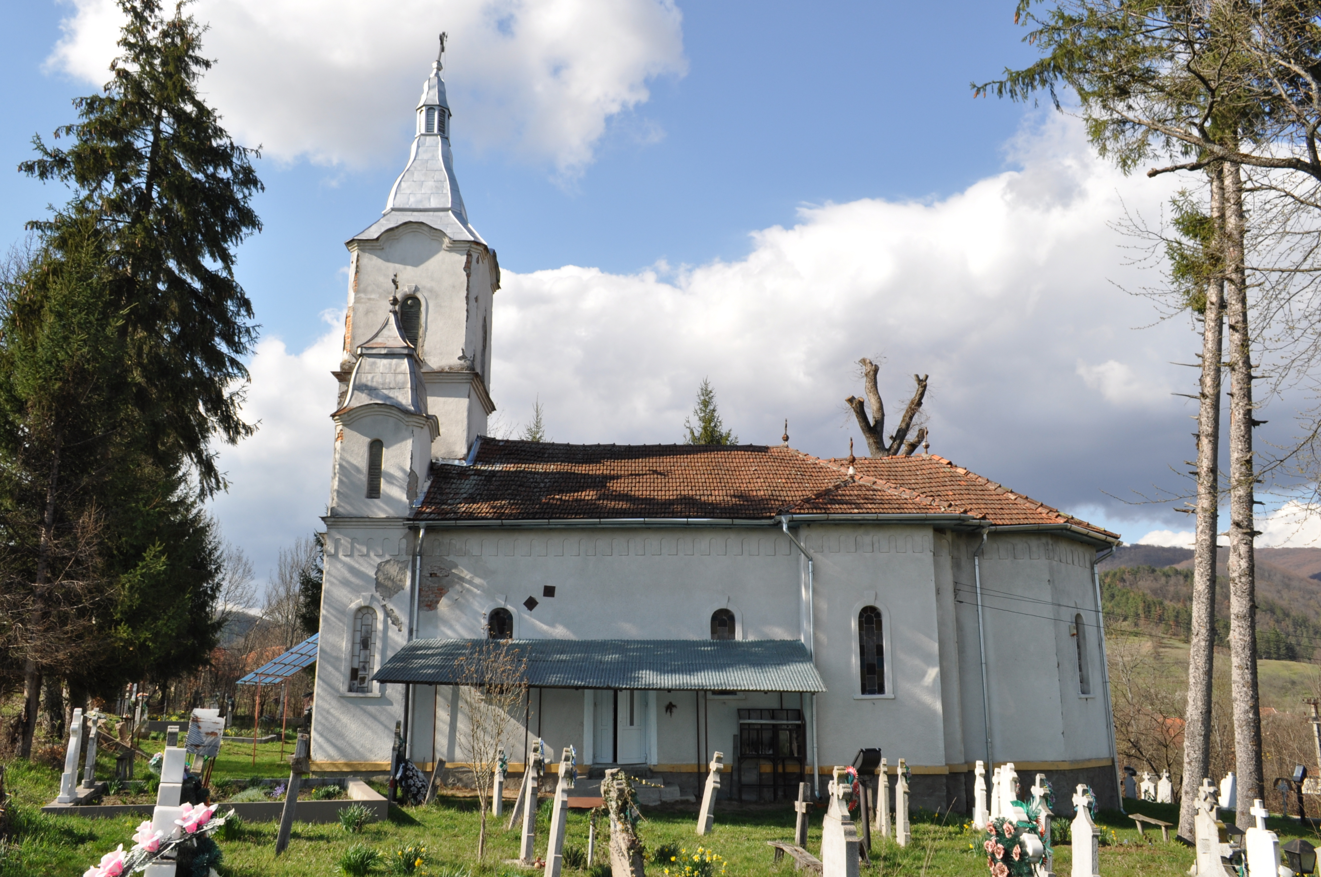 Biserica „Sf. Nicolae", sat DOBROŢ; comuna TOMEŞTI